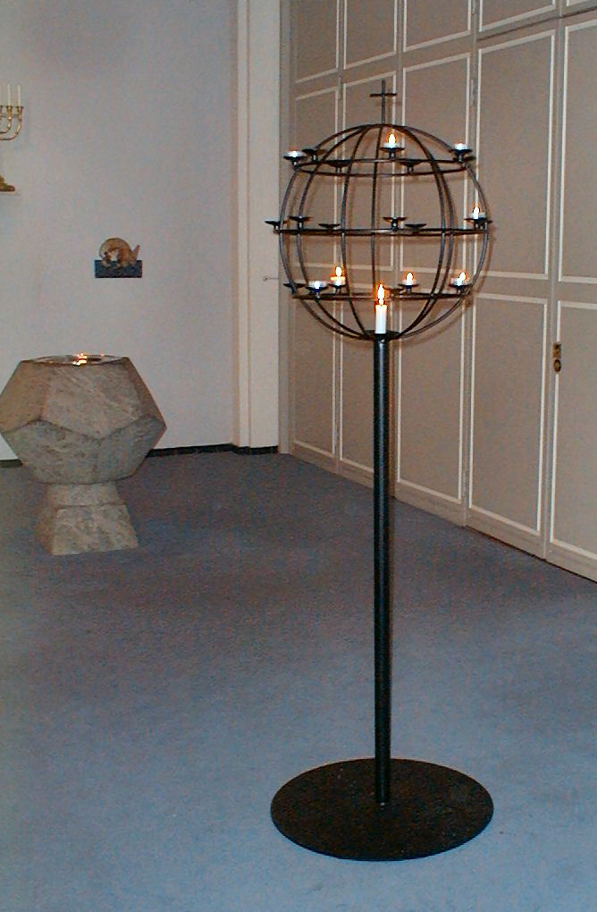 Enghave Kirke, Lysglobe